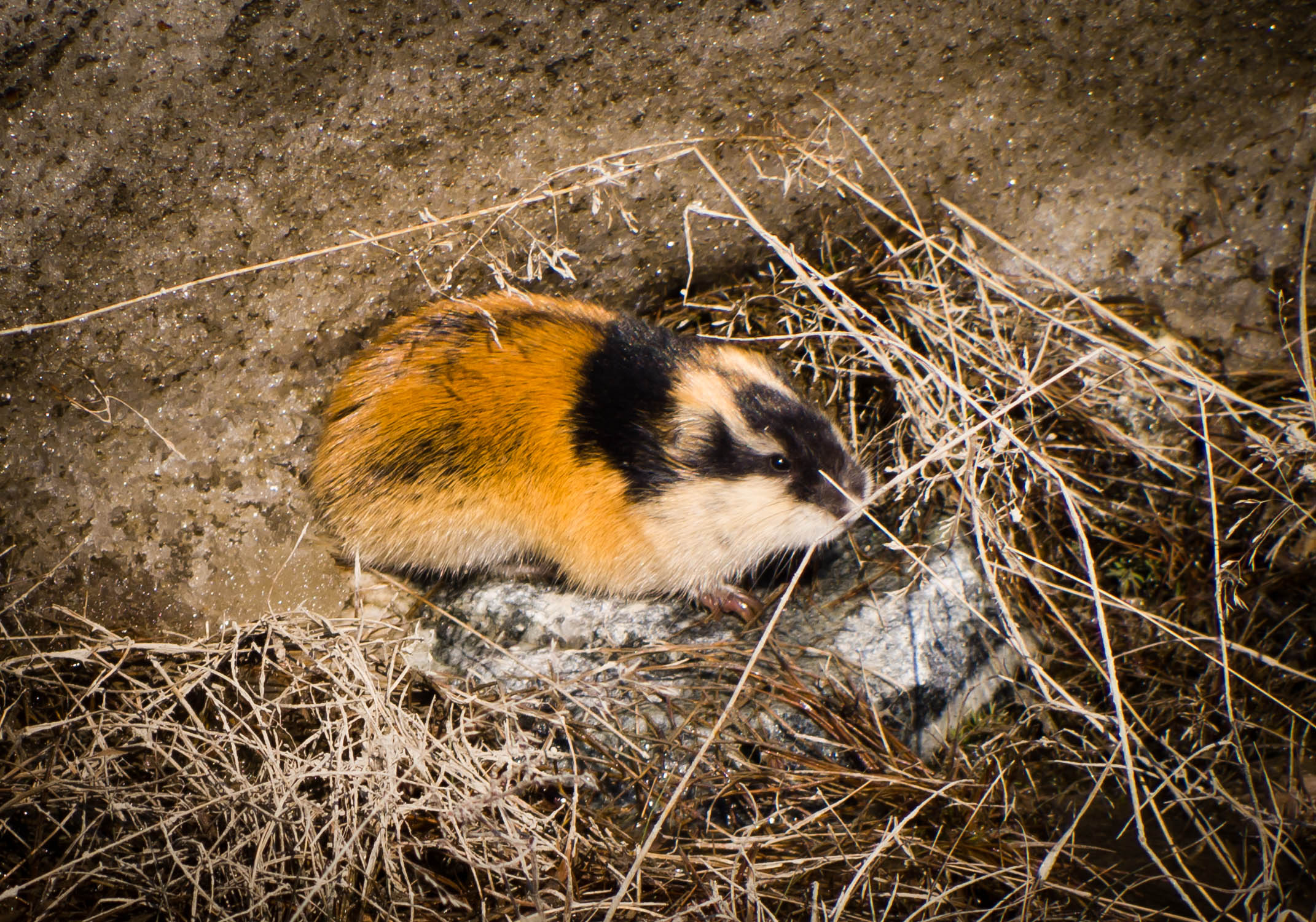 Lemmus lemmus swe: Lämmel eng: Norway lemming